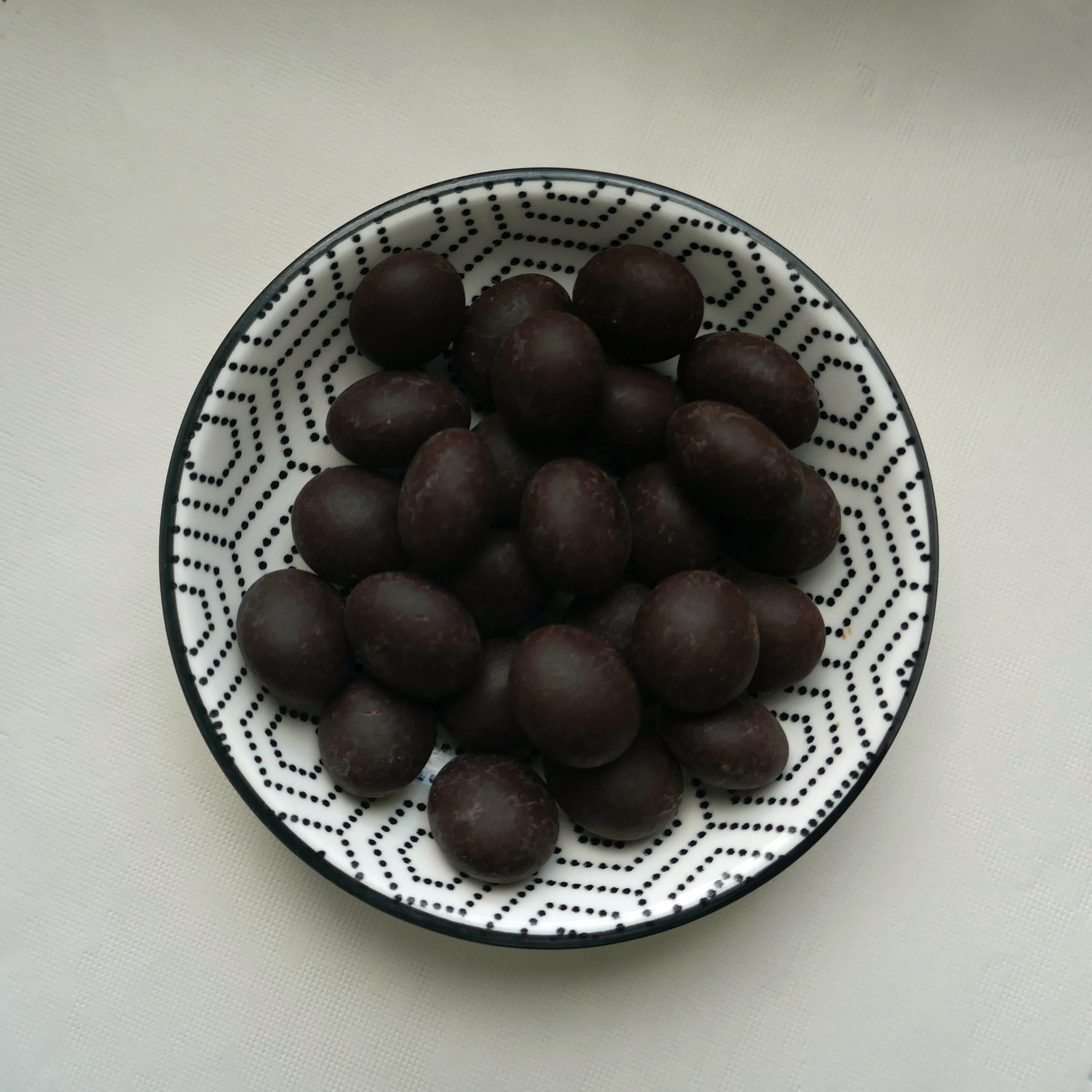 Loucuras de cafés com chocolate (folies de café au chocolat). Modèle 3 NM (Novo Mundo) Grains de café torréfiés provenant de Nova Moca (île de Sao Tomé), recouverts de chocolat 55% , avec du cacao de Terreiro Velho (île de Principe). Production Claudio Corallo, Sao Tomé-et-Principe